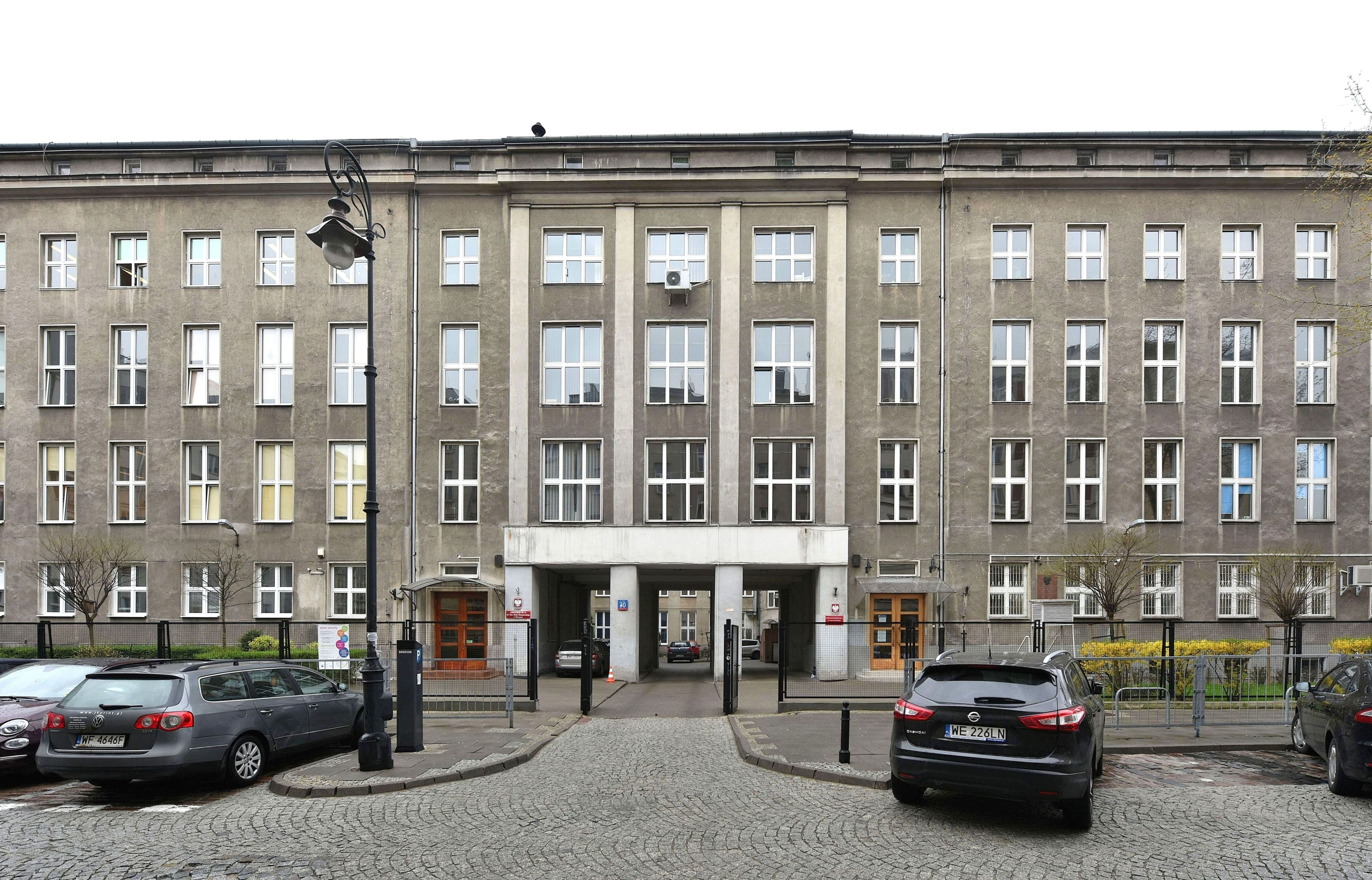 XVIII Liceum Ogólnokształcące im. Jana Zamoyskiego w Warszawie